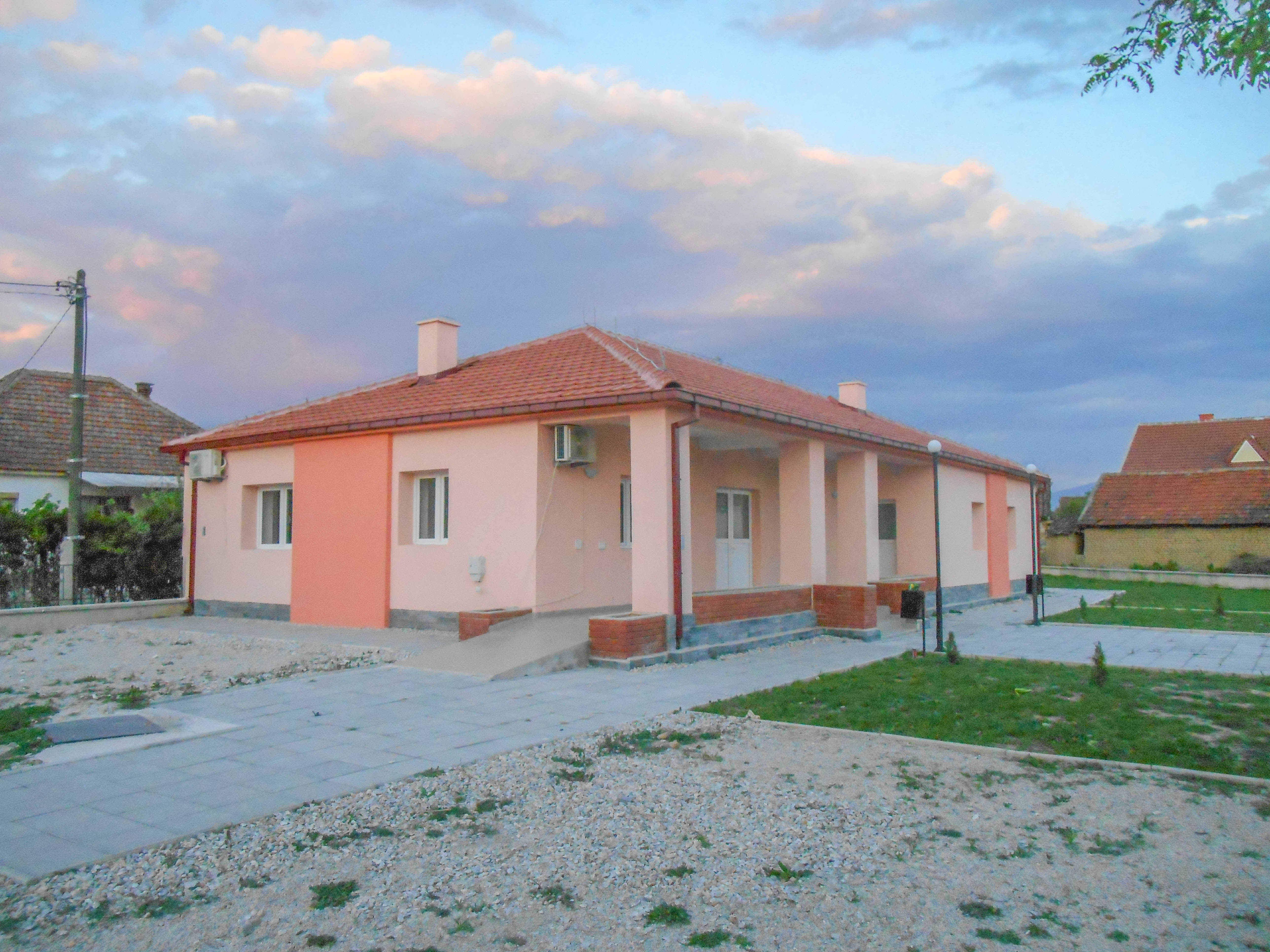 Дом на култура - Радово